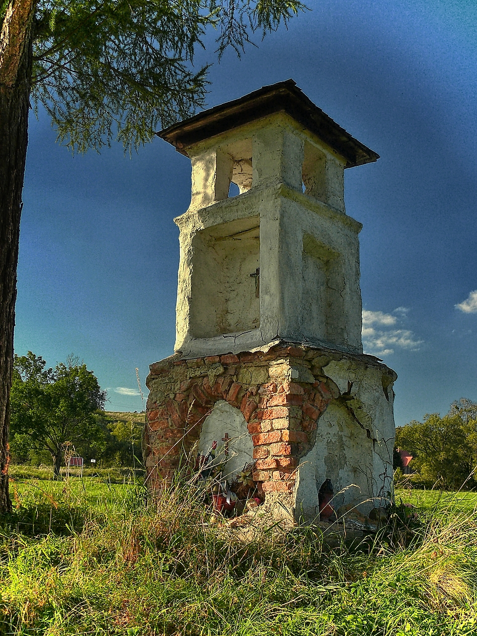 Jedyny trwały ślad po wsi Trójca, w województwie podkarpackim, na terenach Ośrodka Wypoczynkowego Rady Ministrów PRL w Bieszczadach.